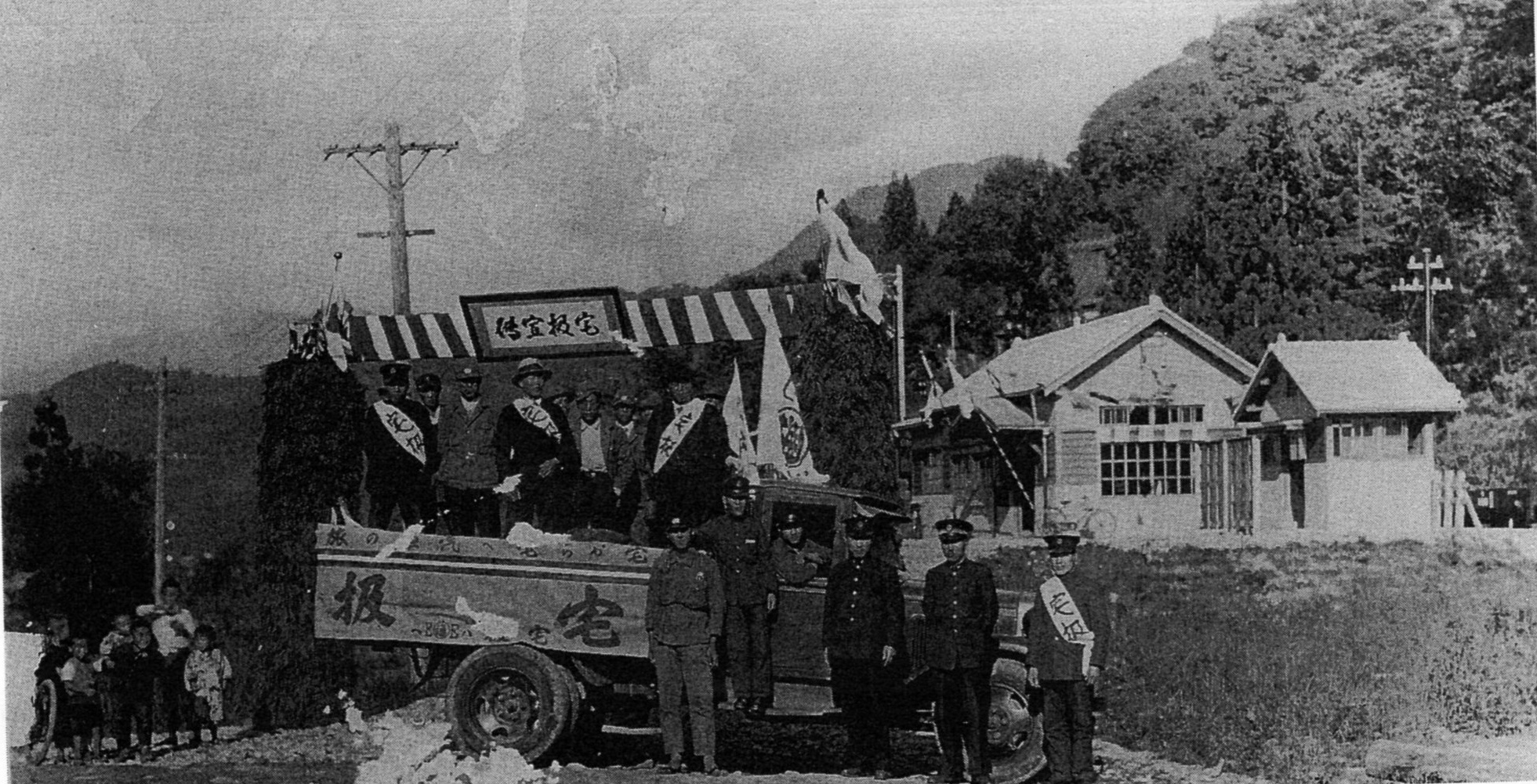 1935年（昭和10年）11月開業当時の様子